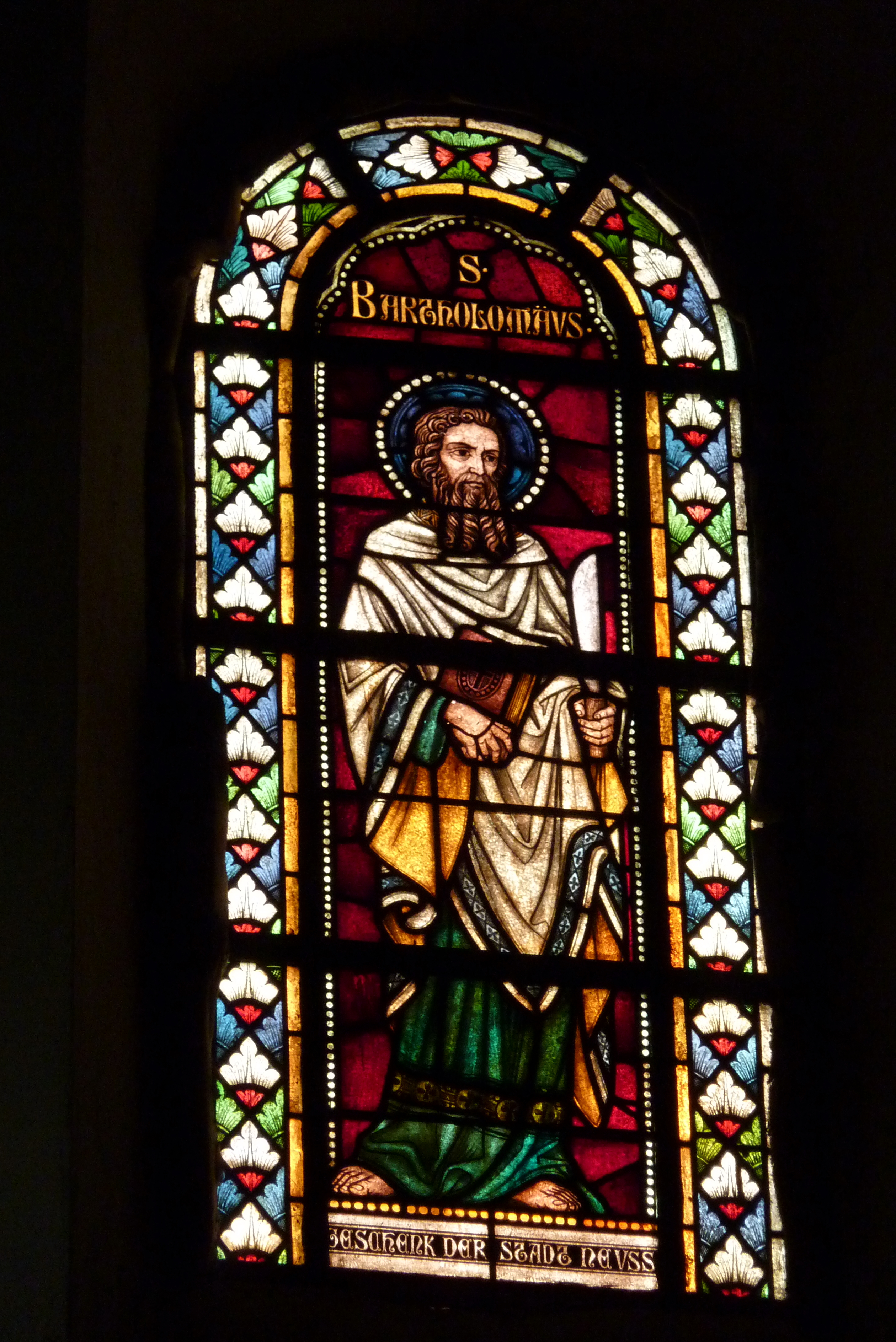 Katholische Kirche St. Maria Magdalena und St. Andreas des ehemaligen Prämonstratenser-Klosters Knechtsteden in Dormagen im Rhein-Kreis Neuss (Nordrhein-Westfalen), Bleiglasfenster im Langhaus, Darstellung: Apostel Bartholomäus